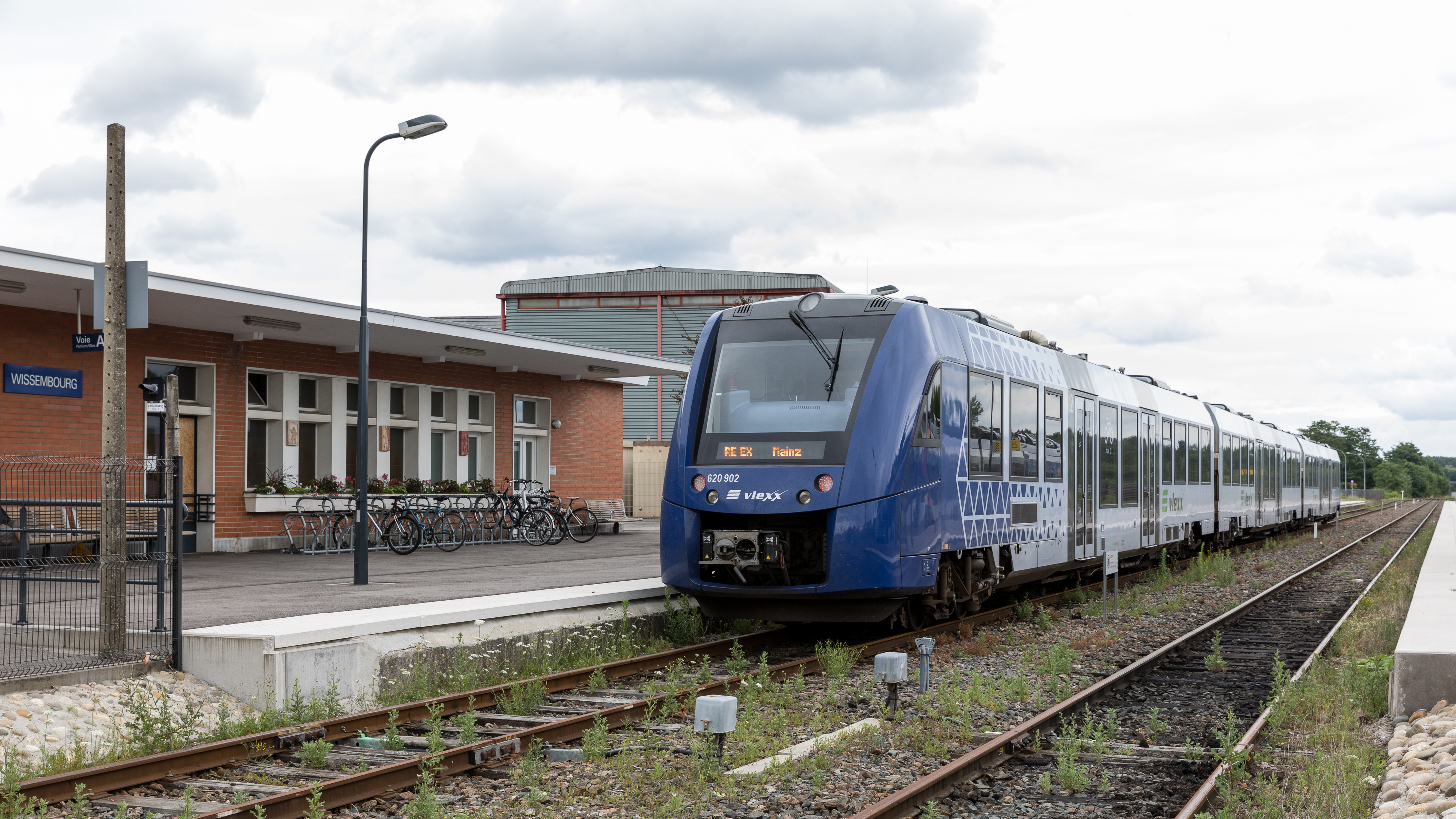 Elsass-Express Wissembourg-Mainz im Bahnhof Wissembourg/Alsace